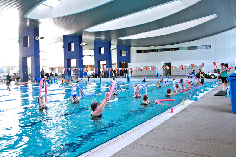 Aqua Aerobics